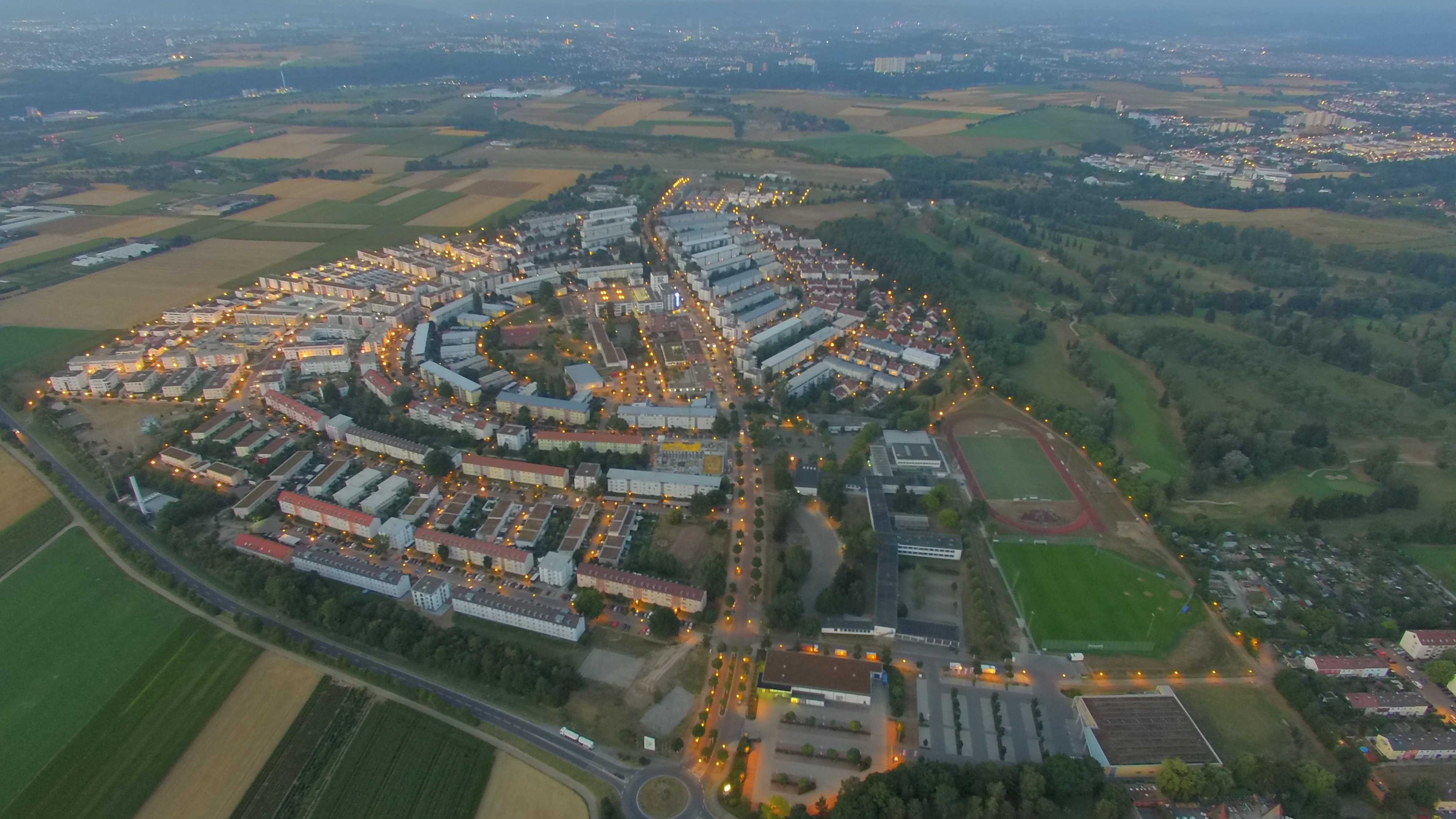 Pattonville erwacht - August 2015. Luftaufnahme Richtung Südsüdost; Im Vergleich zum 2. Bild ist hier der Ausbau Pattonvills zu erkennen (Supermärkte als auch die erweiterte Wohnbebauung)